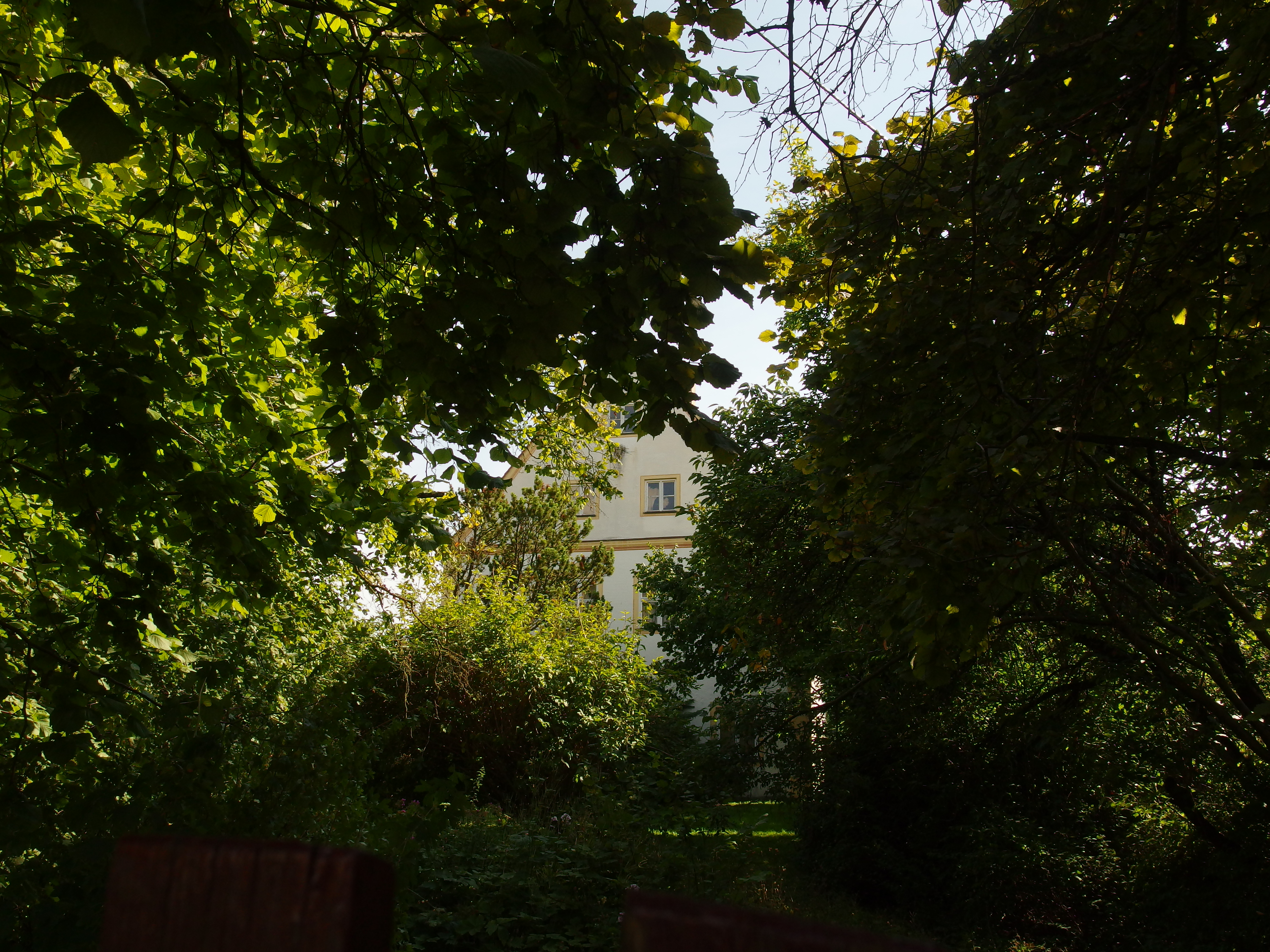 Genderkingen, Schloßstrasse 4; Ehemaliges Sommerschloß des Klosters Kaisheim; von Nord 1This is a photograph of an architectural monument.